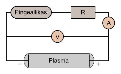 Katseskeem plasma voltamperkarakteristiku määramiseks